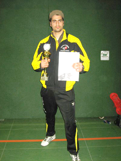 Makram Ben Salah: Kumite Auszeichnung